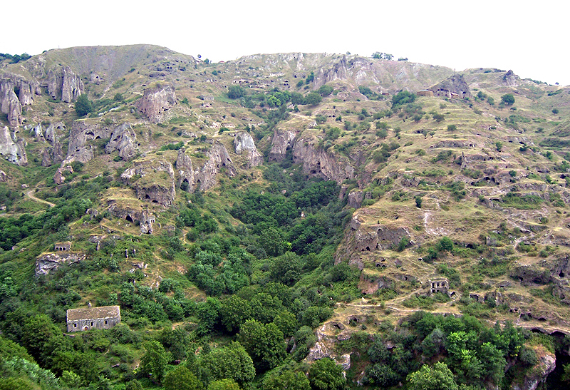 Пещерный город, Хндзореск